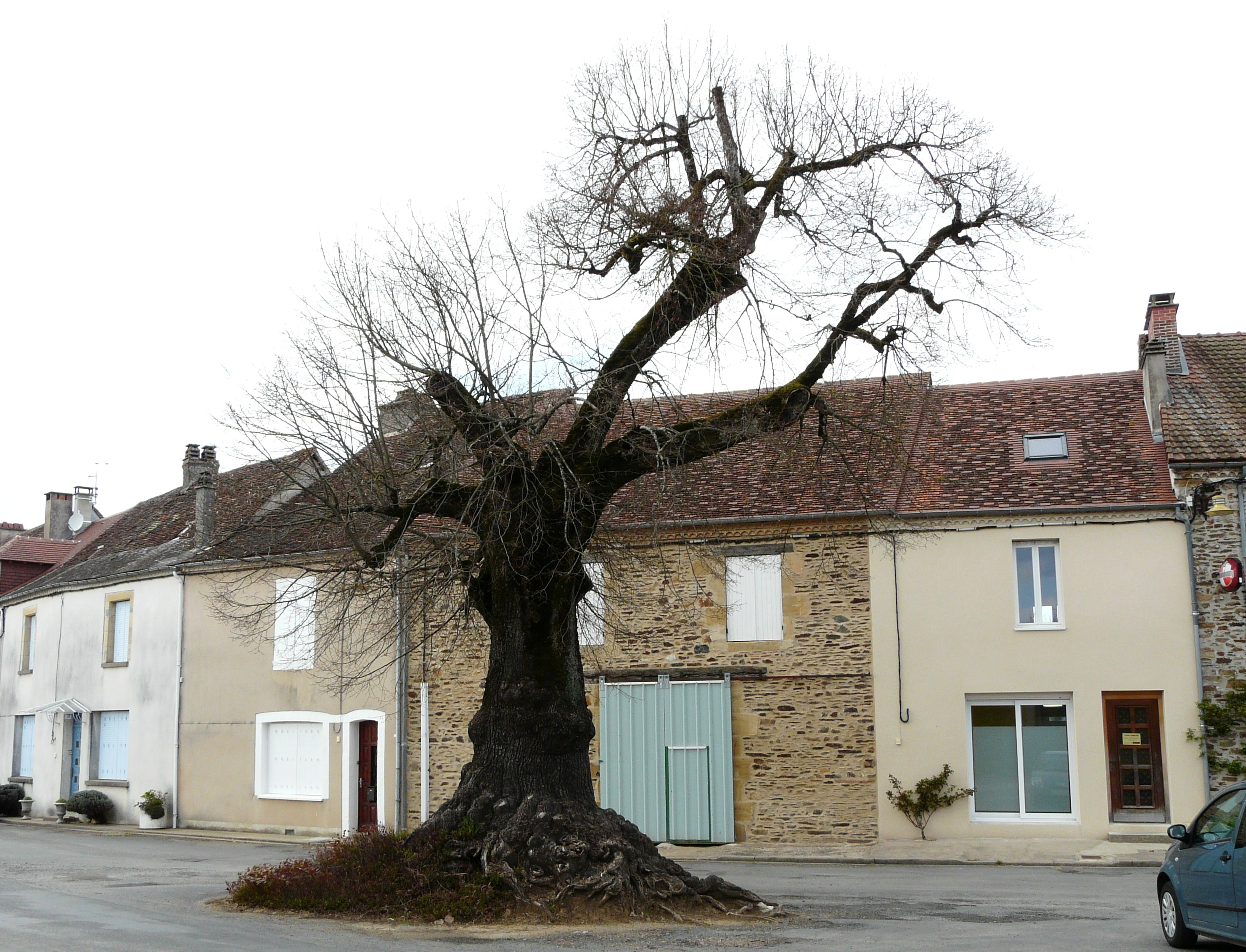 La place du bourg, Angoisse, Dordogne, France